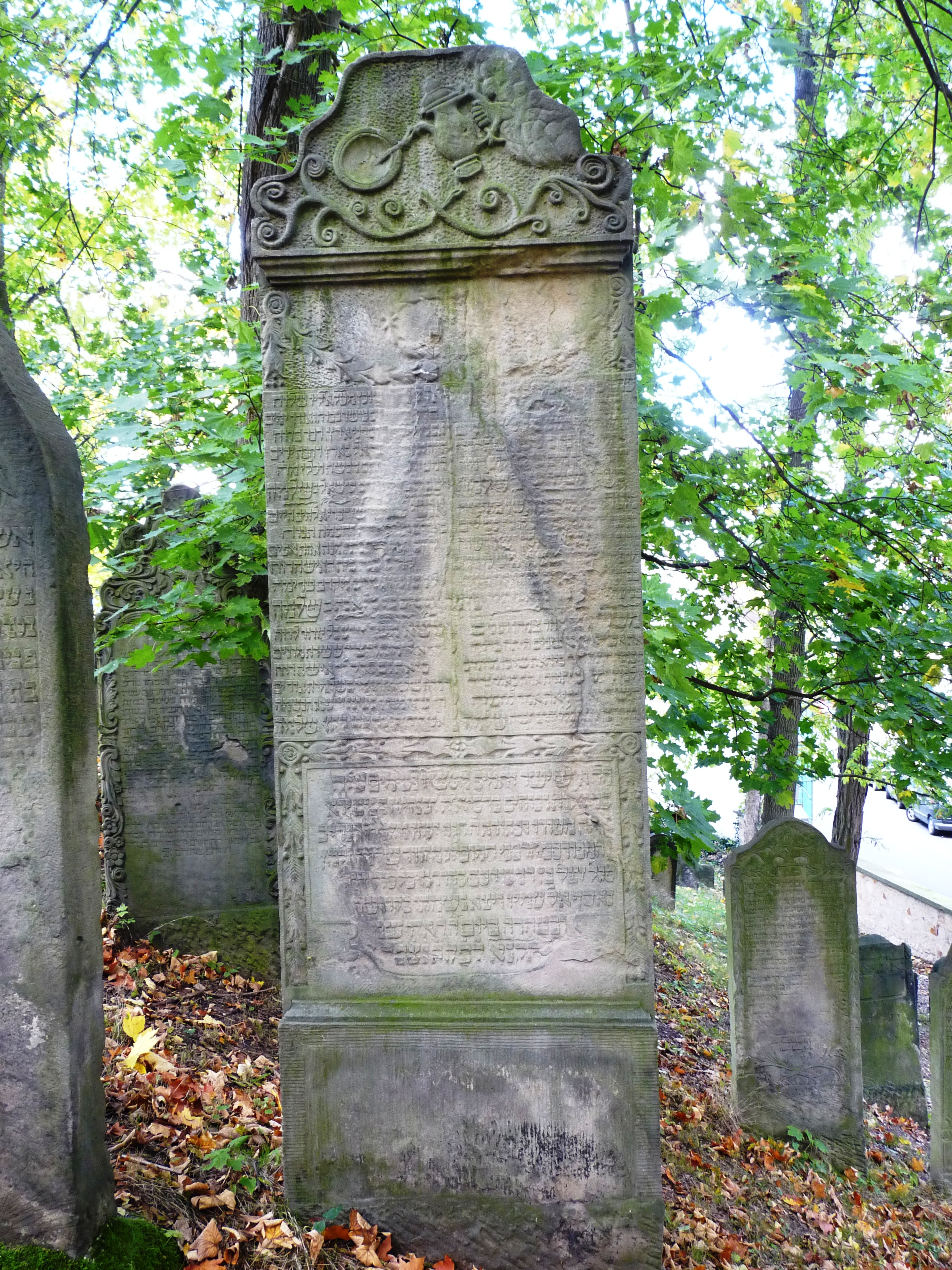 Grab salomon Michael avid auf dem jüdischen Friedhof Oberstraße | Grab Nr. 241